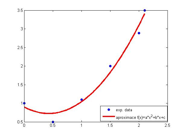 Graf jsem udělal v Matlabu z hodnot, který jsem odhadnul tak, aby na výsledném grafu bylo vidět jasně, že data jsou změřena s chybou, ale také to, jak krásně metoda nejmenších čtverců hledá nejoptimálnější závislost. Graf jsem pak z matlabu exportoval do JPG.